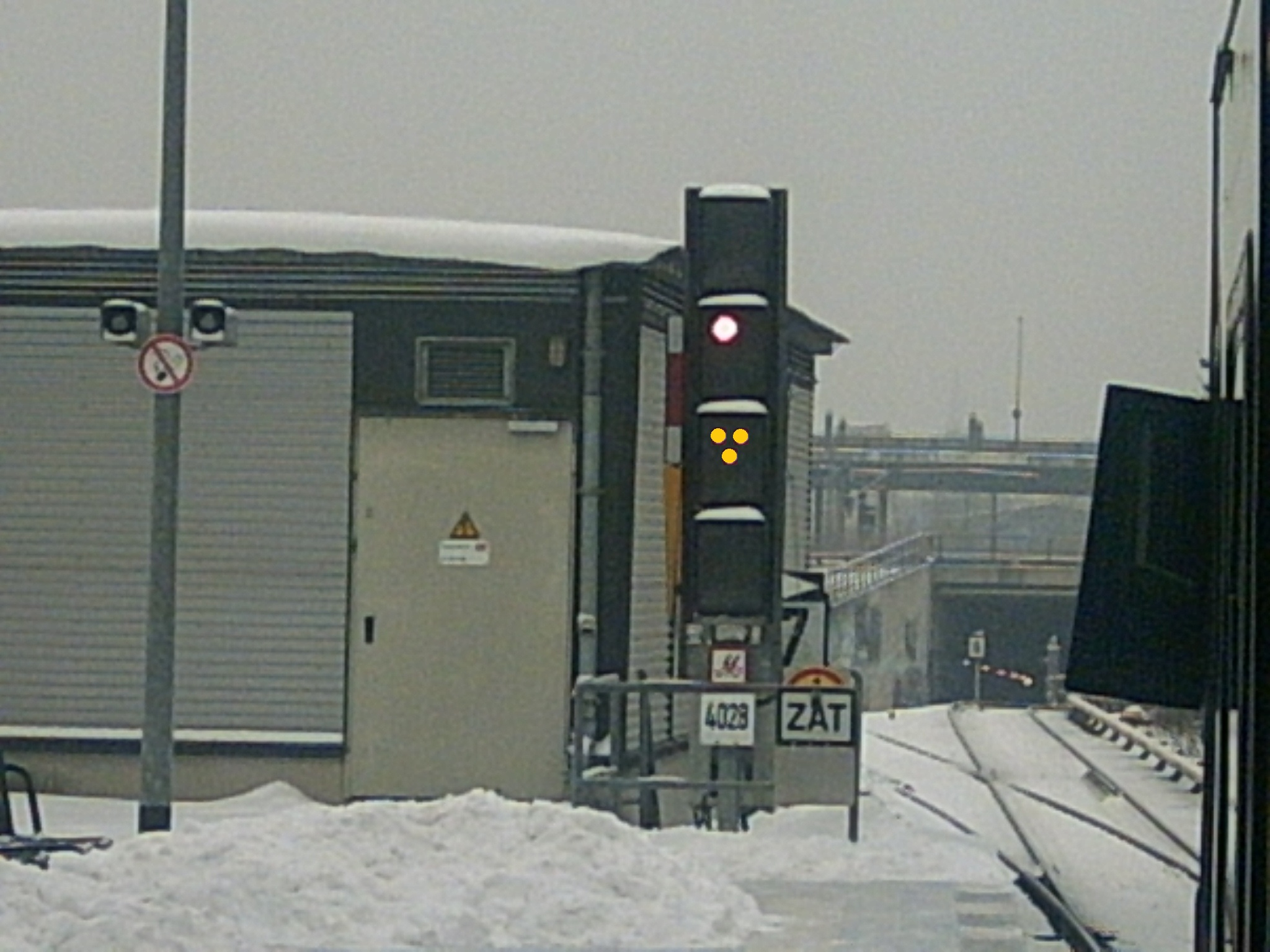 Das Ks-Signal 4028 in Berlin Bornholmer Straße. Weil die Weiche nicht ging, musste der Zug über das Vorsichtsignal fahren und auf Sicht fahren.